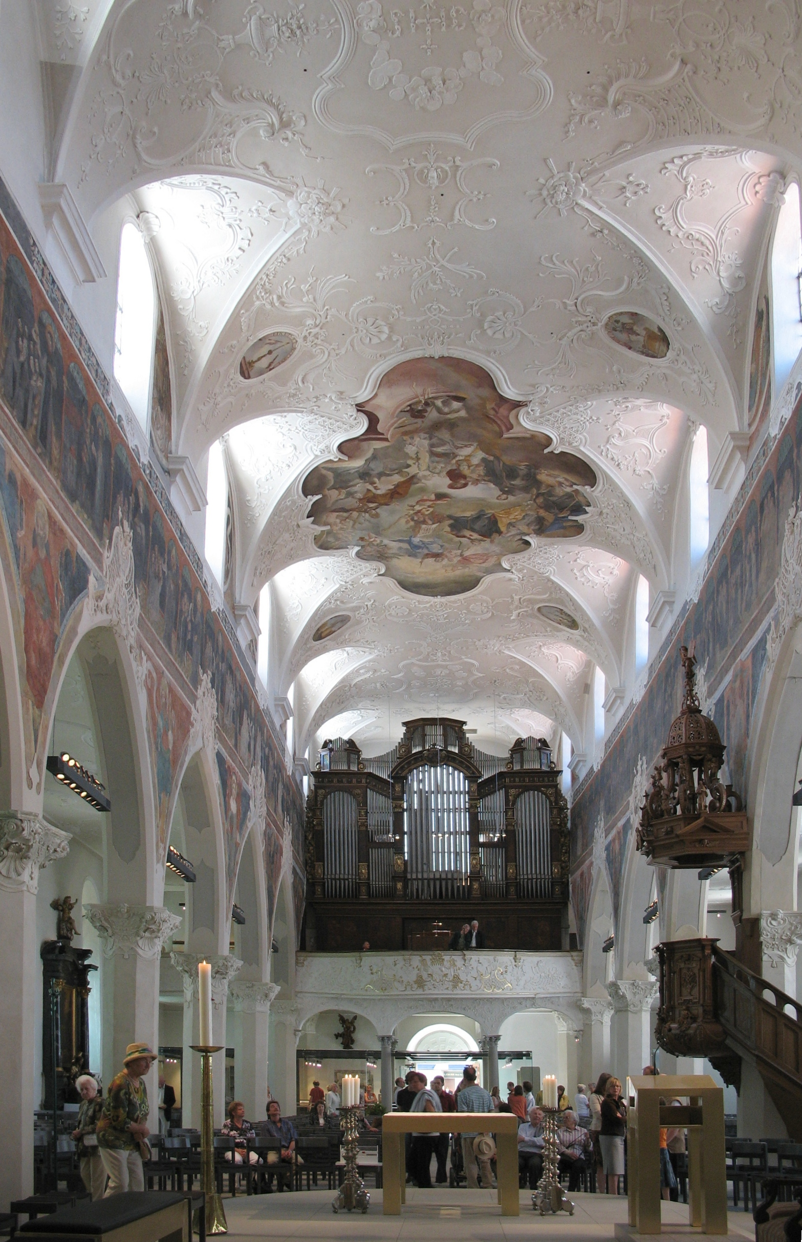 Konstanz, Dreifaltigkeitskirche, Mittelschiff, Blick nach Westen